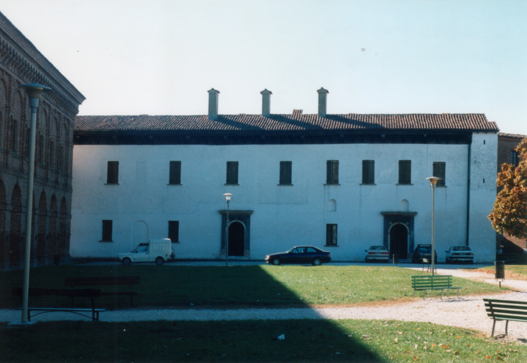 Sabbioneta - Palazzo del Giardino o Casino.